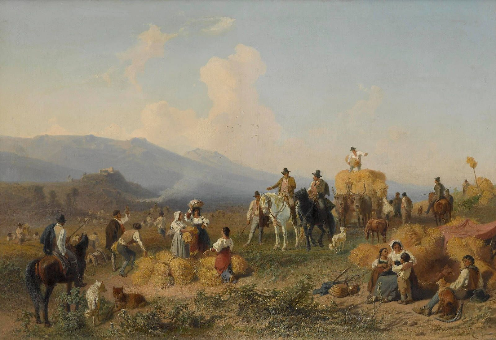 Getreideernte in der römischen Campagna. Signiert und Ortsbezeichnung Roma. Öl auf Leinwand. 82 x 119 cm